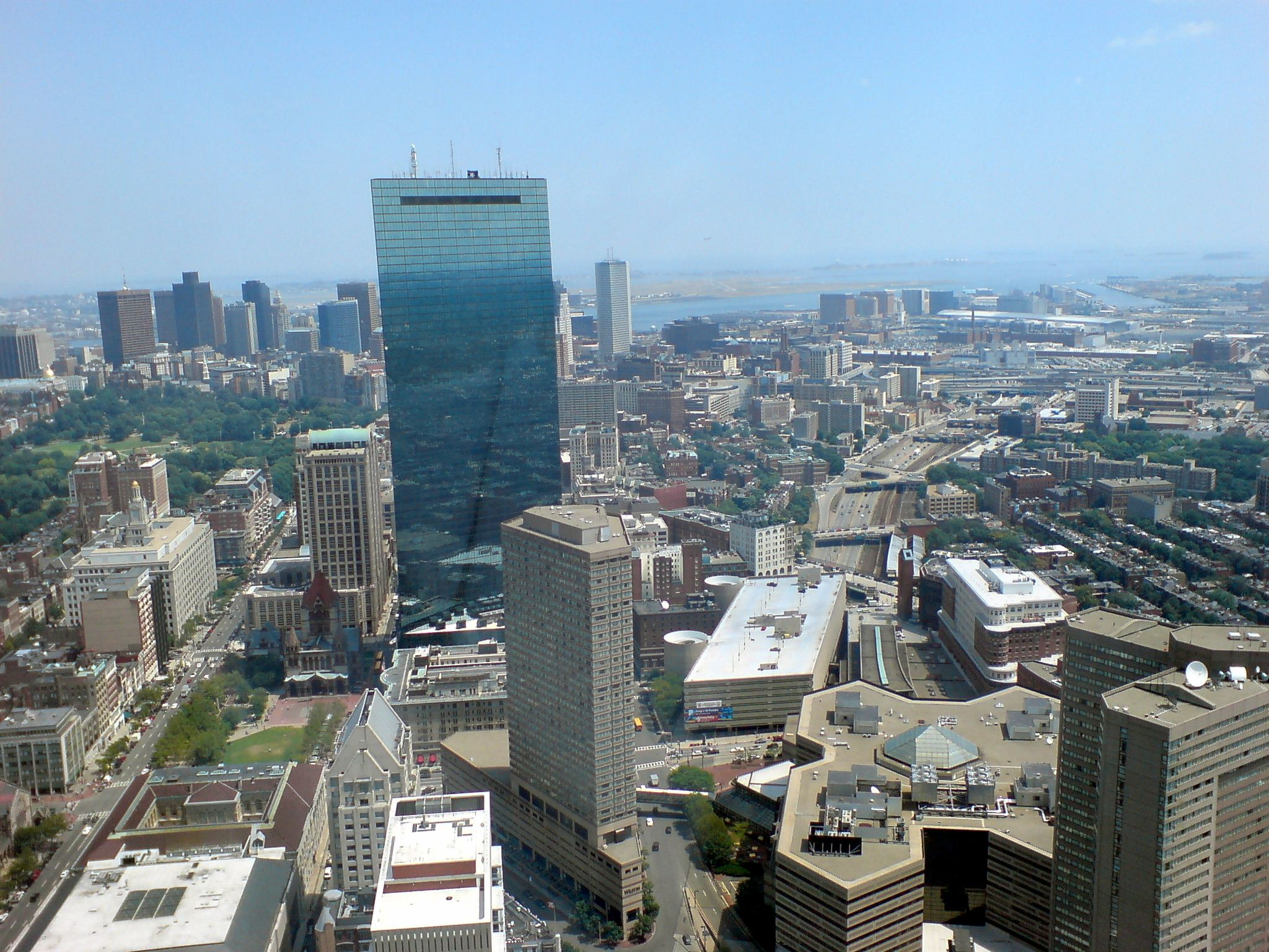 Luftblick über Boston, von der Aussichtsplattform des Prudential Tower